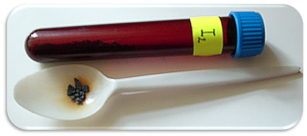 Pevný jod